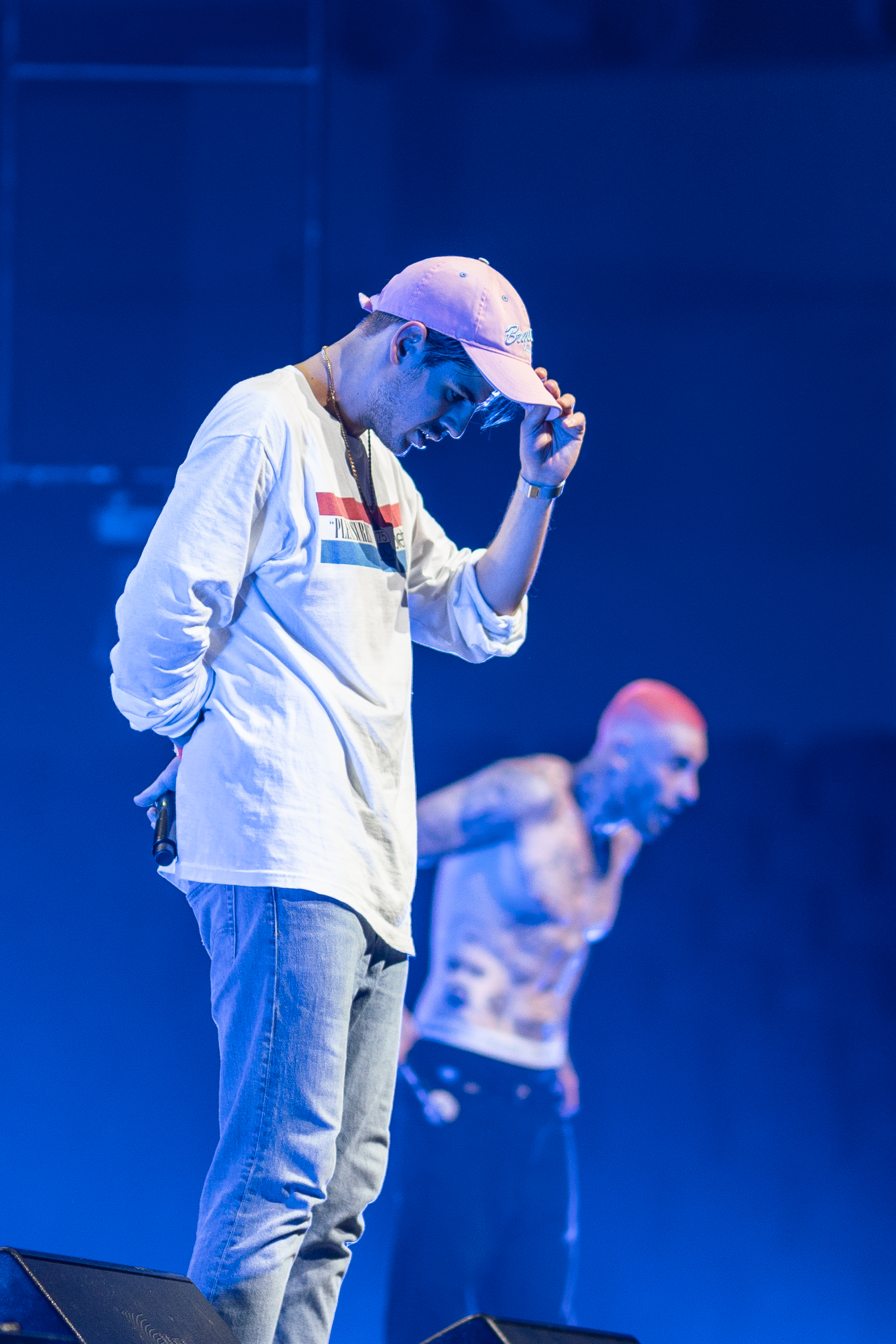 Taconafide podczas koncertu w Warszawie w ramach trasy Ekodiesel Tour promującej debiutancki album Soma 0,5 mg.